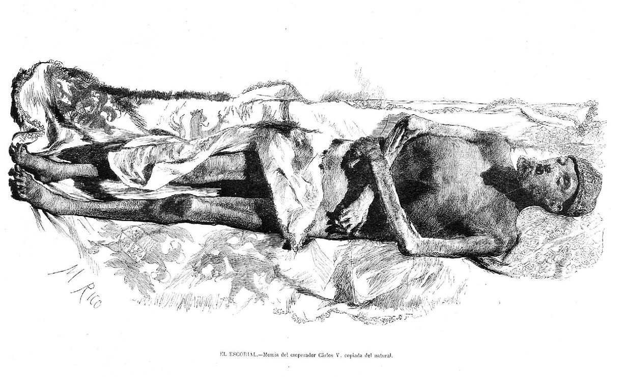 «El Escorial, momia del emperador Carlos V, copiada del natural», en la revista española La Ilustración Española y Americana.